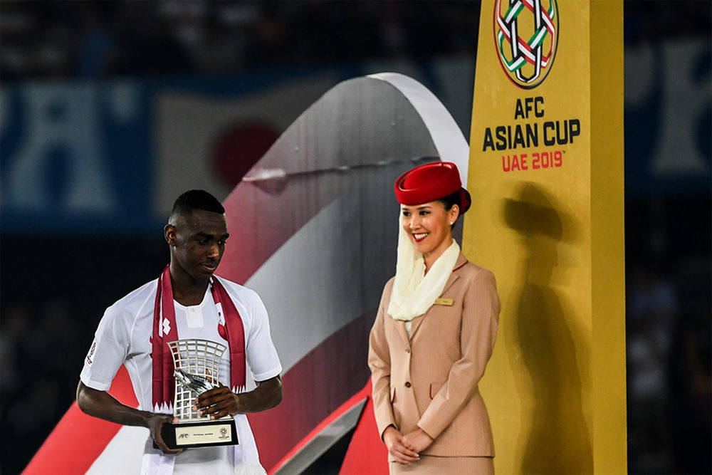 فینال جام ملت های آسیا ۲۰۱۹ - دیدار قطر و ژاپن دیدار تیم های ملی فوتبال قطر و ژاپن در مرحله نهایی هفدهمین دوره جام ملت های آسیا ۲۰۱۹ امارات ، با برتری ۳ بر یک قطر در ورزشگاه بن زاید شهر ابوظبی بر